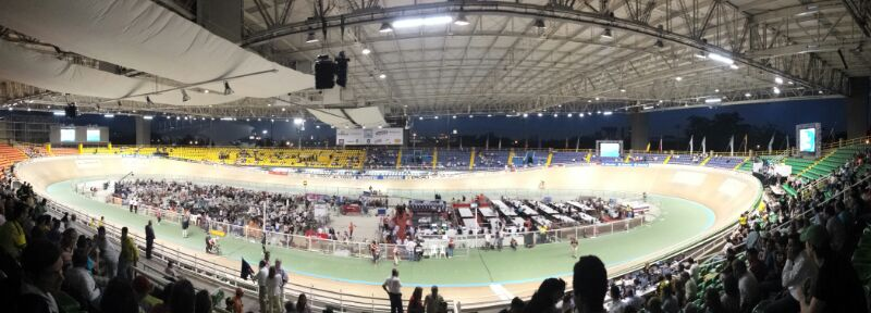 Velodromo Alcides Nieto Patiño en el Mundial de Ciclismo en Pista UCI 2014